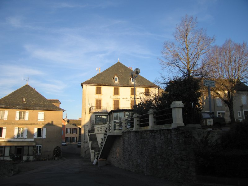 Rieupeyroux, France, december 2006